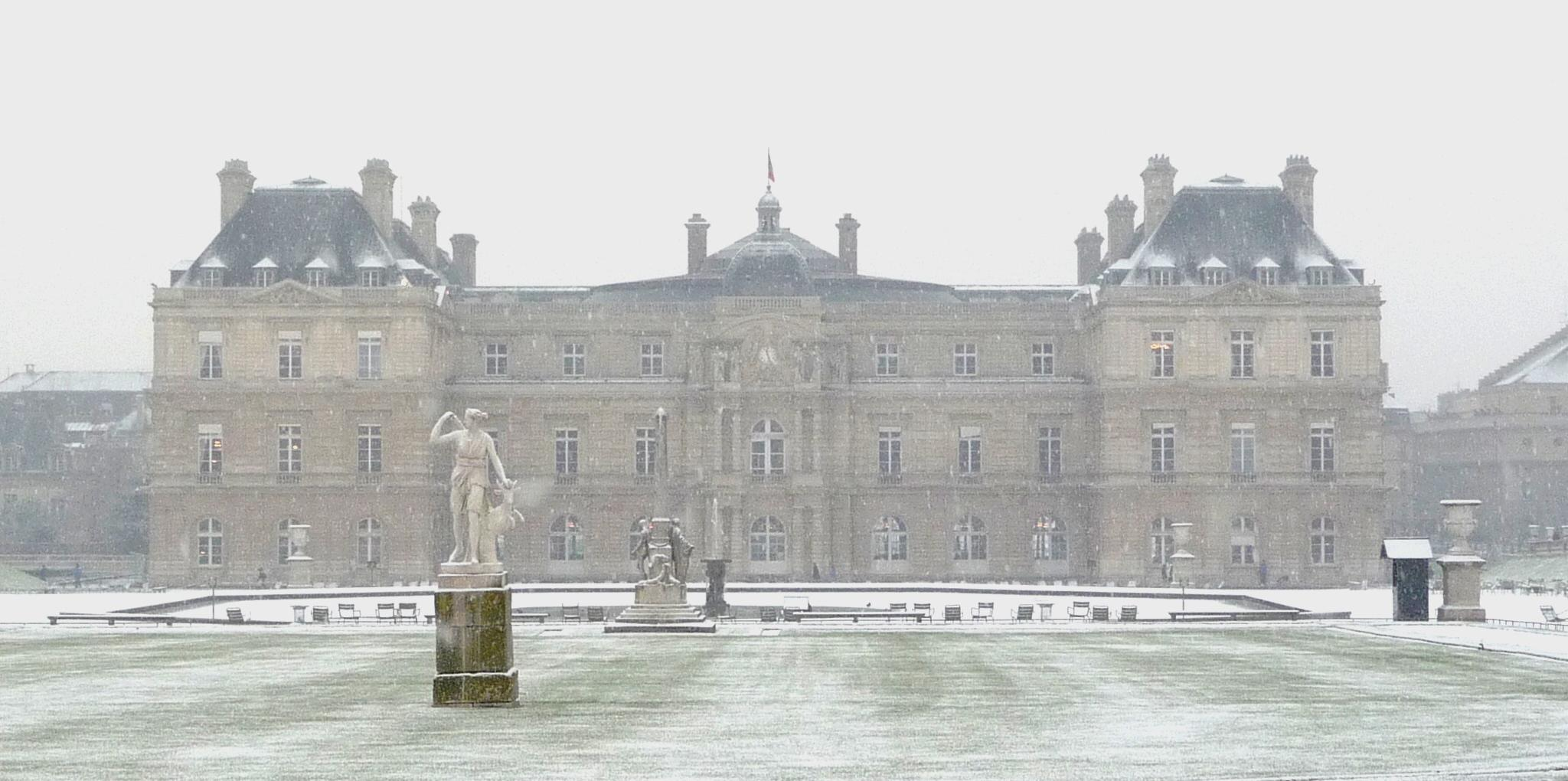 Paris (Île-de-France, France) : Palais du Luxembourg sous la neige.